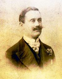 Louis de Talleyrand-Montmorency, duc de Montmorency.